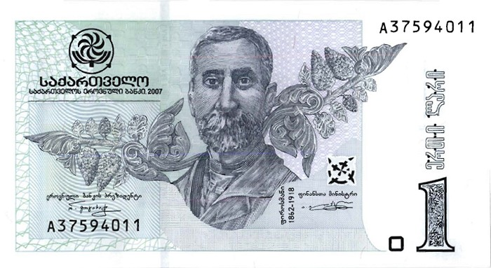 1 lari